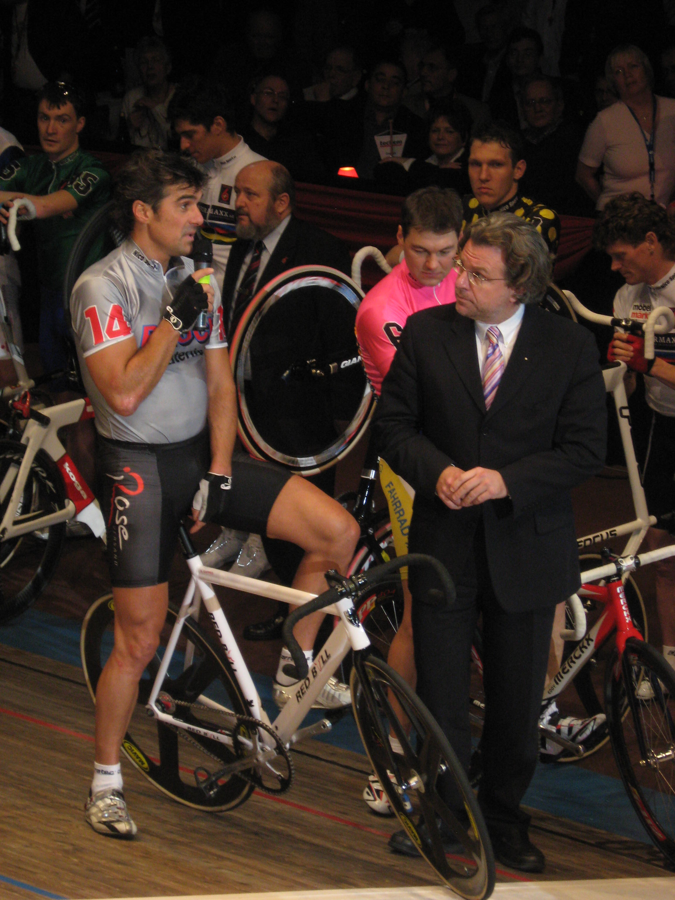 Abschied von Andreas Kappes beim Sechstagerennen in Berlin 2008, Hallensprecher Christian Stoll (r.)